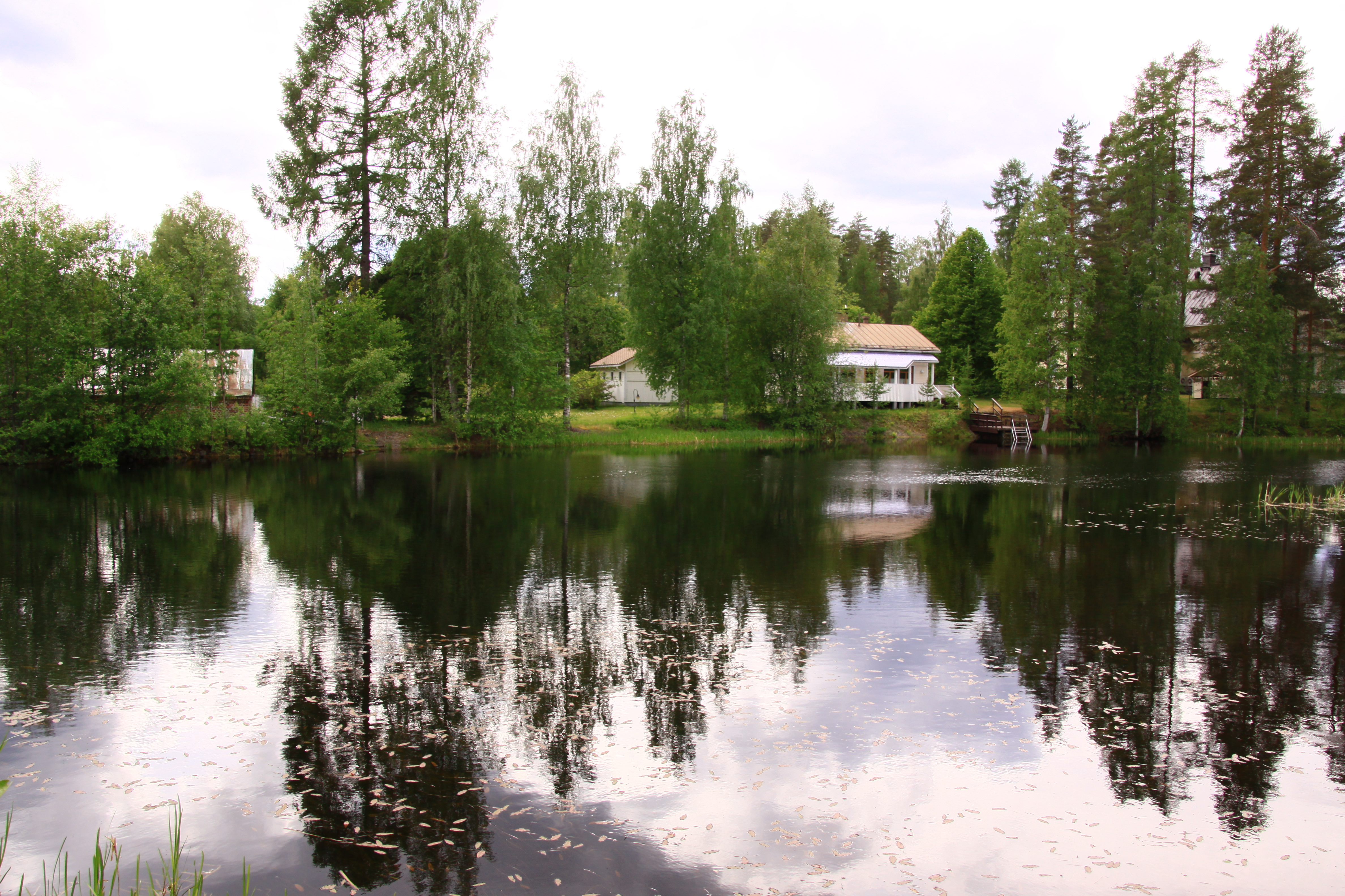 Näkymä Sorsakoskella Välimerelle.